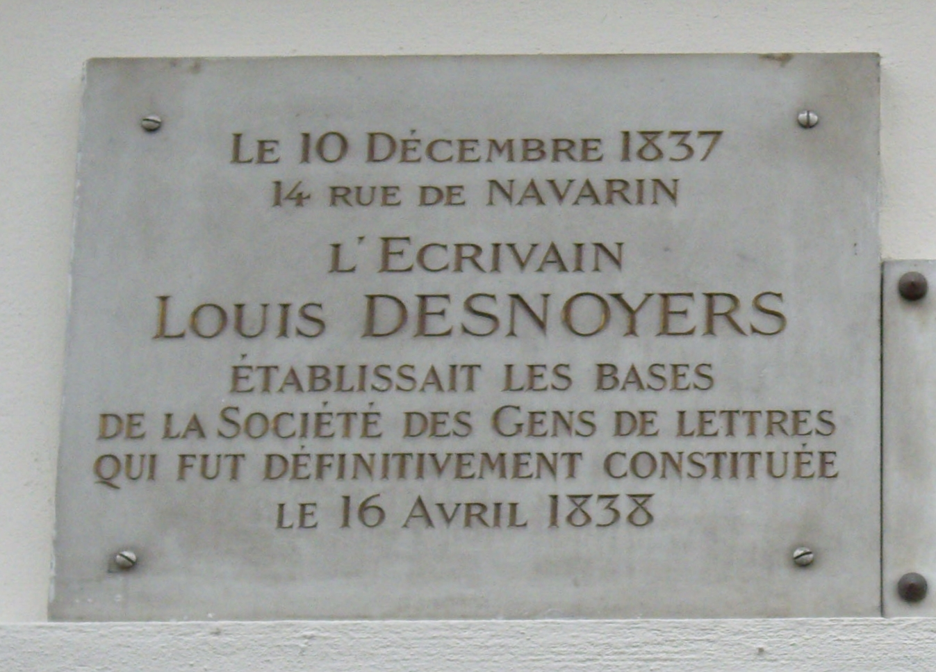 Plaque apposée sur le n° 14 de la rue de Navarin, Paris 9e, domicile du journaliste et écrivain Louis Desnoyers (1805-1868), où il établit en 1837 la Société des gens de lettres, qui y tint l'année suivante sa première assemblée.